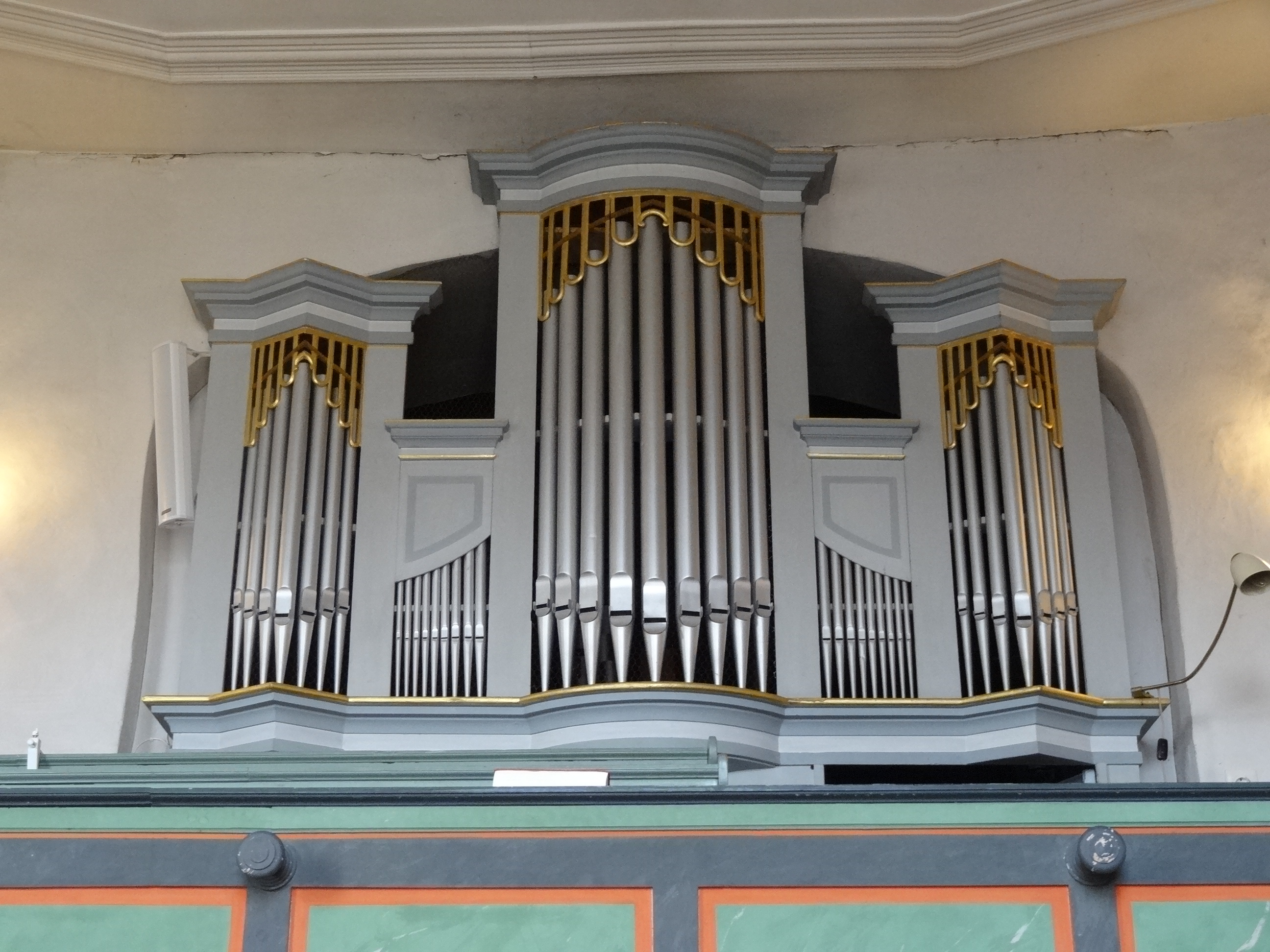 Evangelische Pfarrkirche Ober-Widdersheim